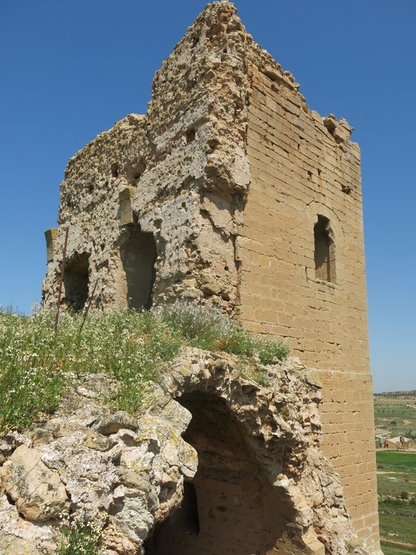 Castell de Sarroca de Lleida a la comarca del Segrià - Catalunya